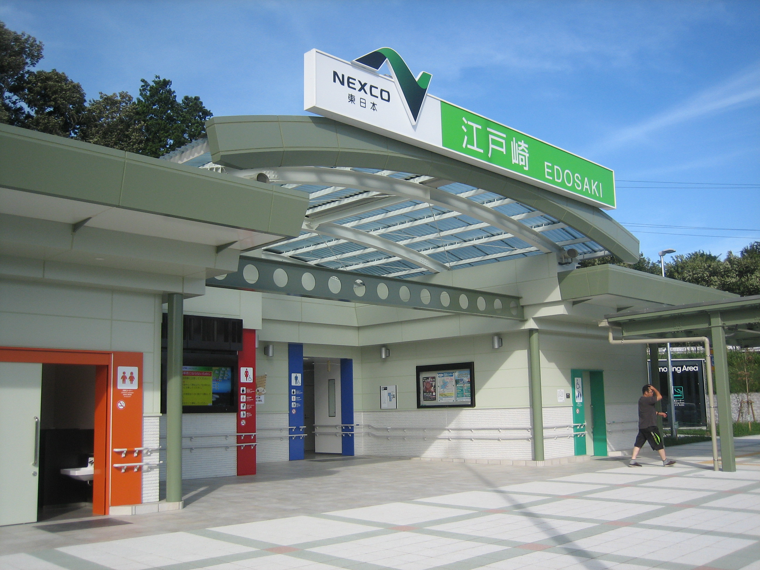 茨城県にある首都圏中央連絡自動車道のパーキングエリア。